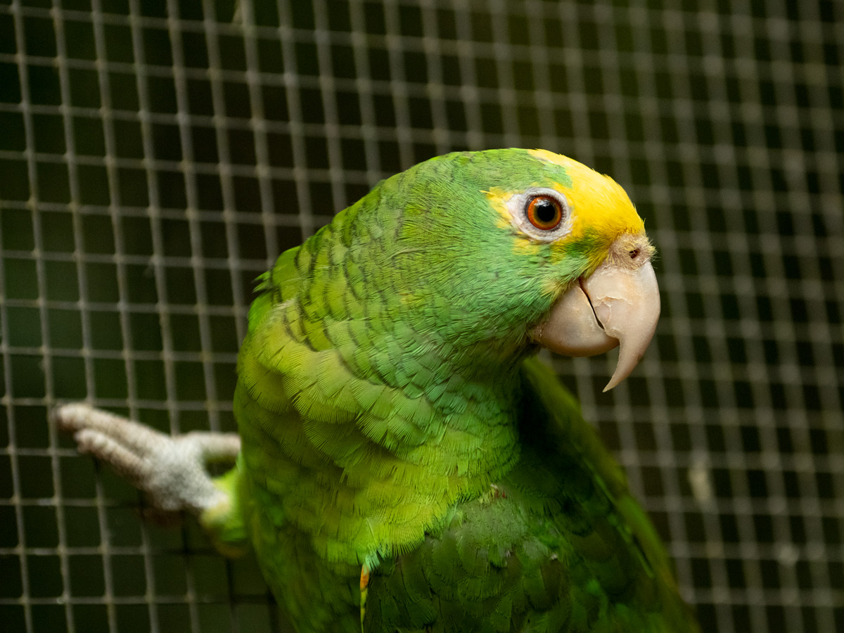 Junge Gelbkopfamazone (A. oratrix belizensis)